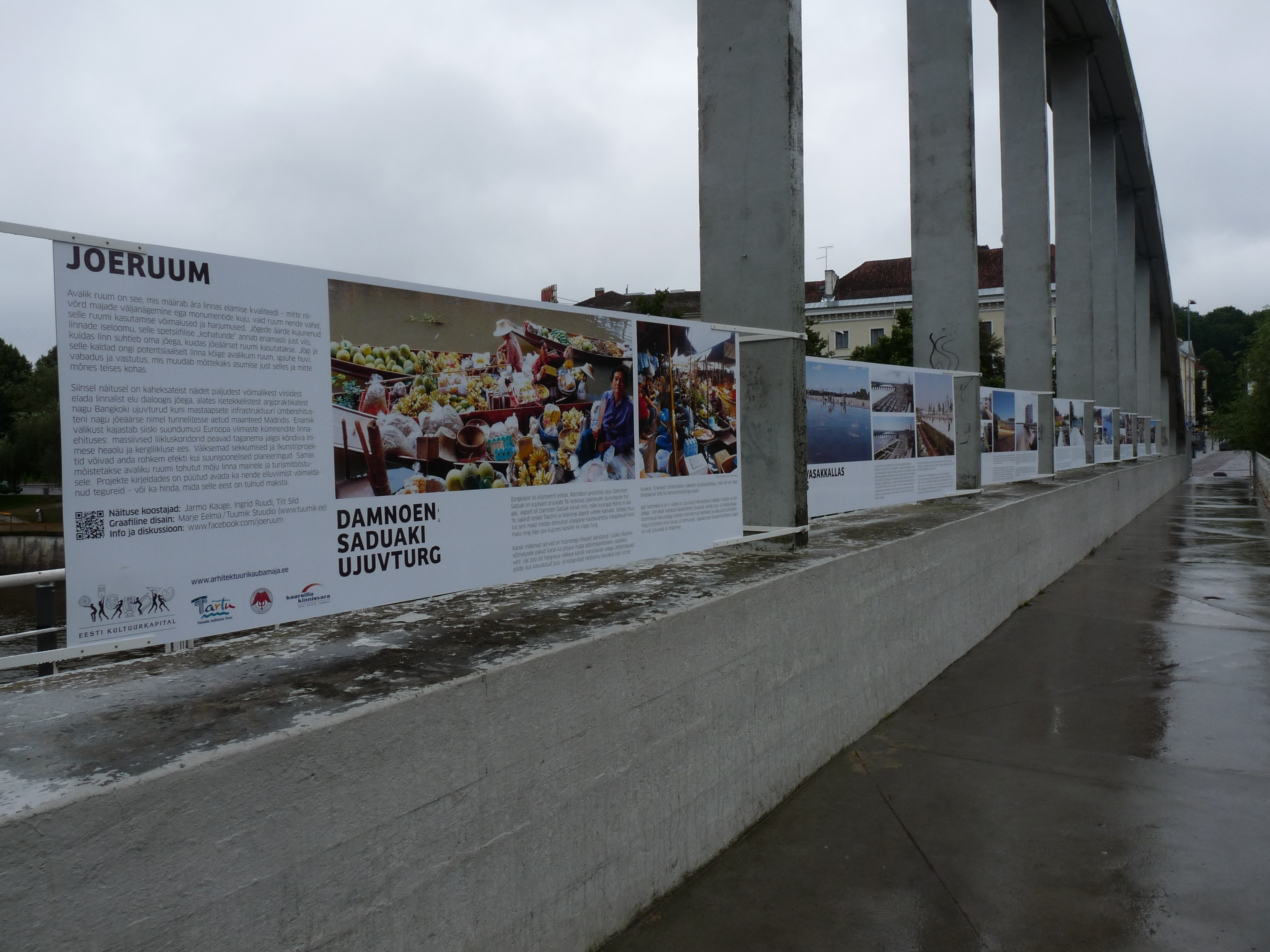 Näitus 'Jõeruum' Tartu Kaarsillal, 20. august 2012